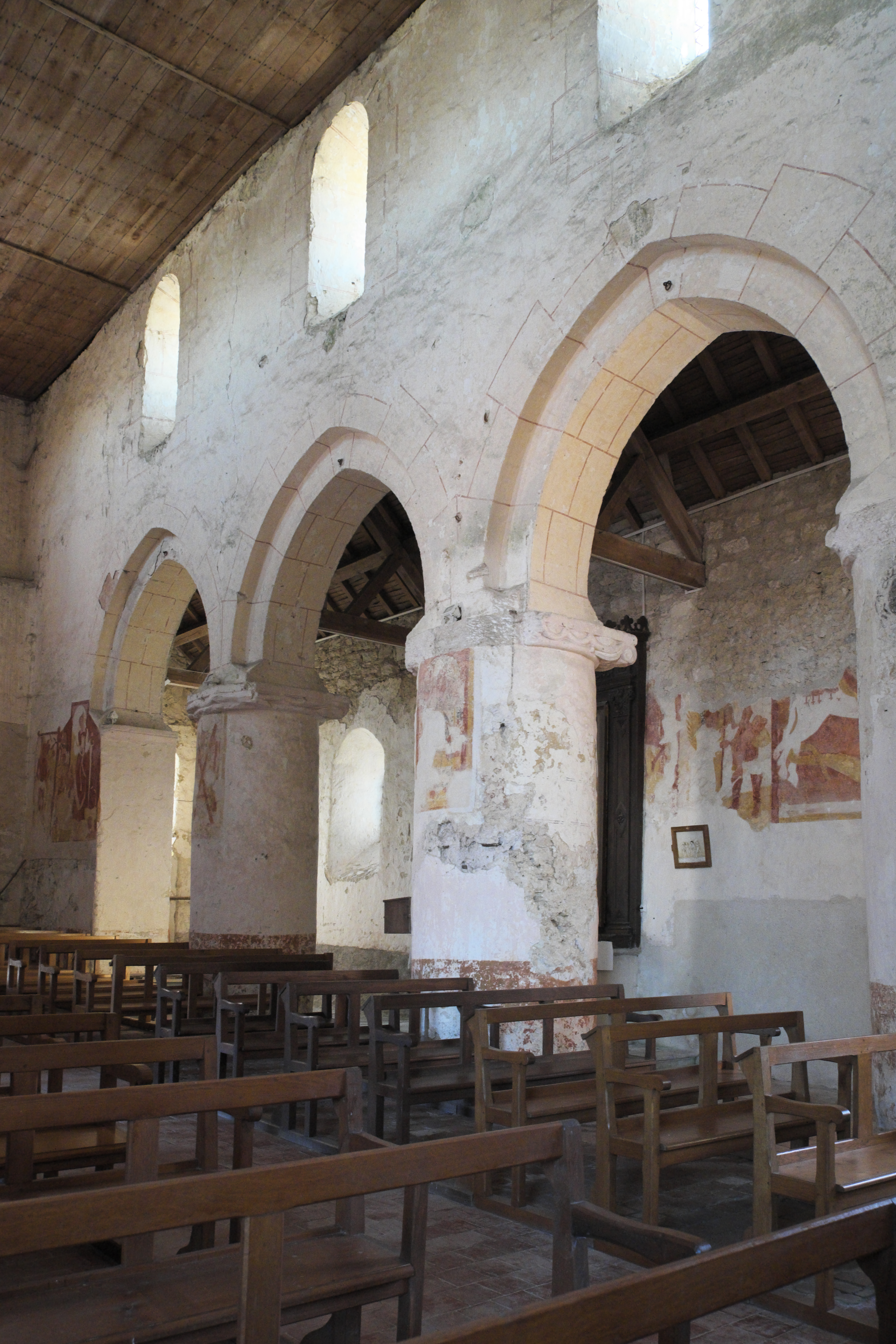 Katholische Kirche Saint-Pierre in Vert-la-Gravelle (Vert-Toulon) im Département Marne in der Region Grand Est/Frankreich, Innenraum, Säulen im Langhaus